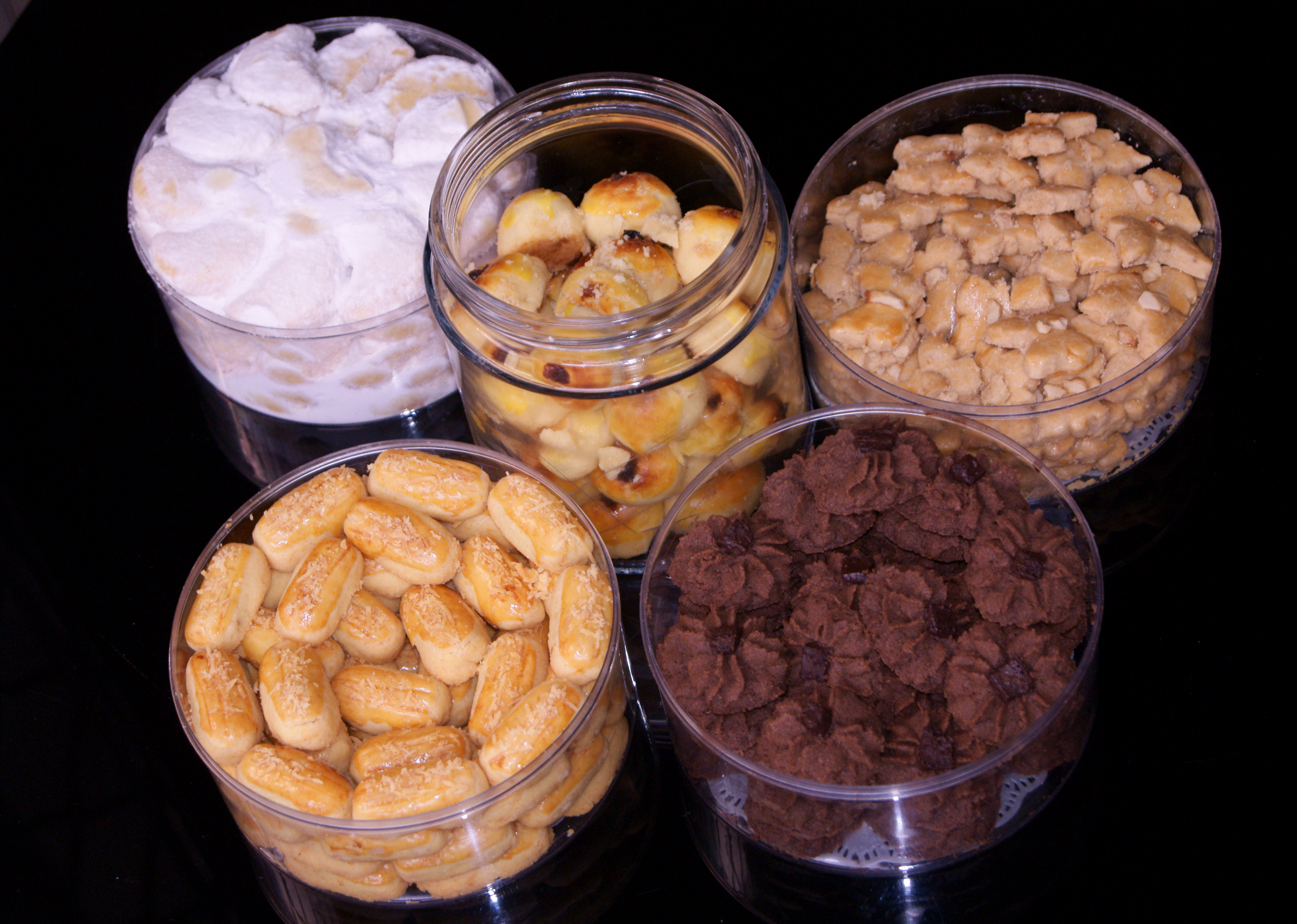 Kue kering jamuan Idul Fitri